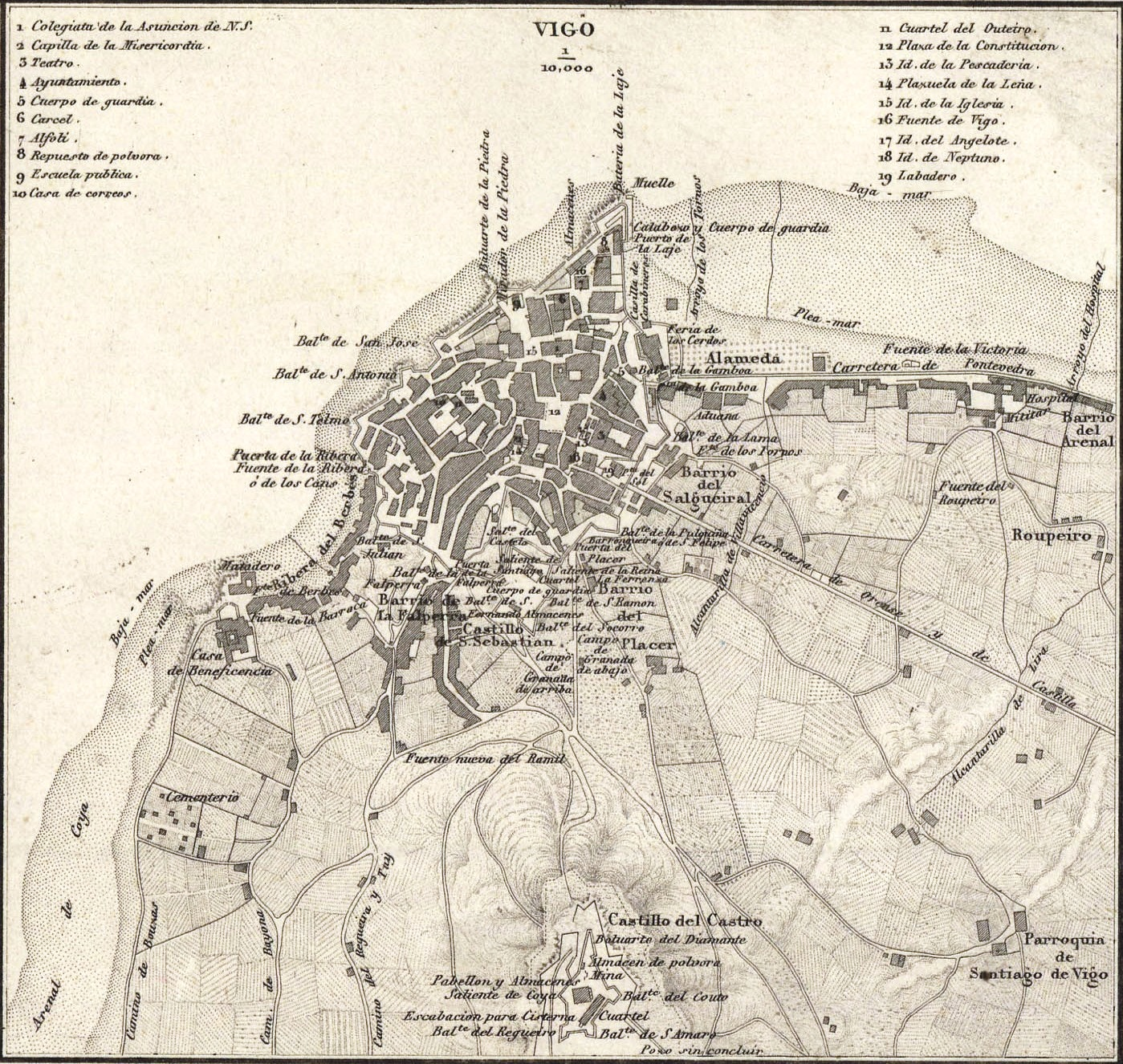 Vigo, part of Pontevedra / por el Coronel, Teniente Coronel de Ingenieros D. Francisco Coello ; auxiliado por D. Pascual Madoz, autor de las notas Estadísticas e Históricas